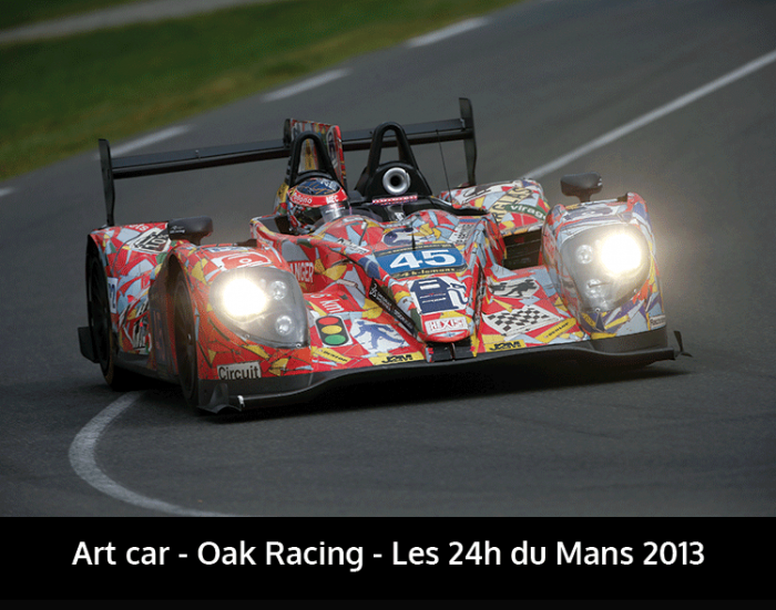 chaque année, les organisateurs des 24h du Mans confient la création d'une voiture artistique "l'Art Car" à un Artiste connu. En 2013 COSTA était le 18ème au monde à concevoir cette oeuvre.